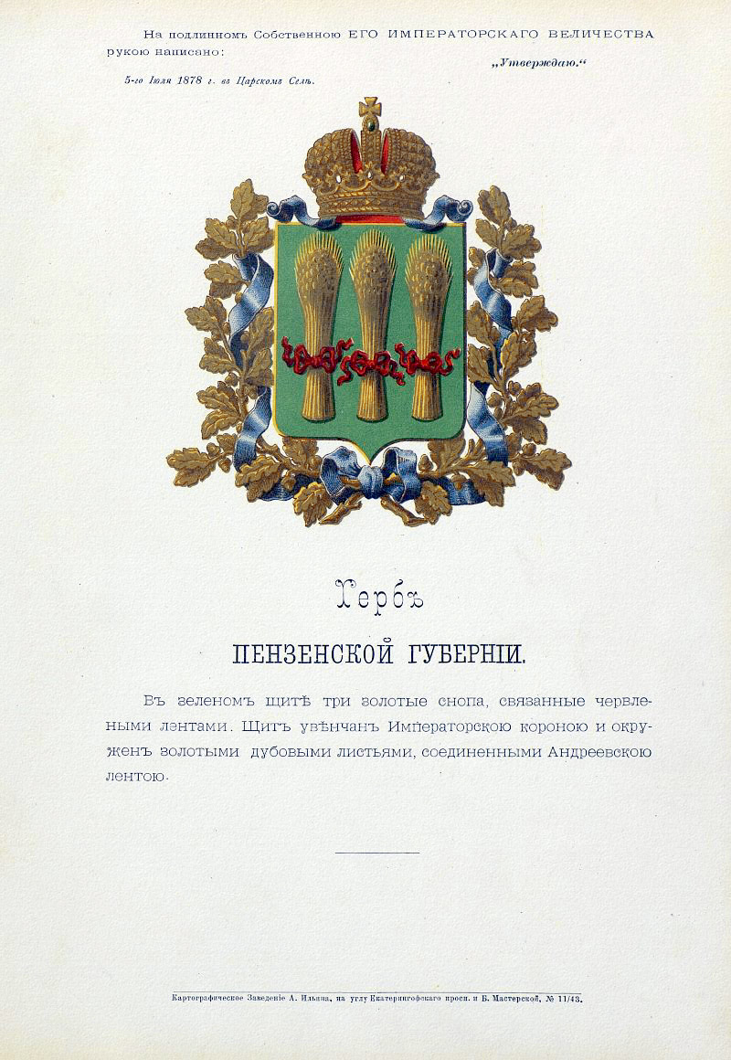 Official Russian Empire coat of arms Penza Governorate. Герб Российской Империи Пензенской губернии с официальным описанием в Гербовнике Бенке. Утверждён Императором Всероссийским Александром Вторым в 1878 году.